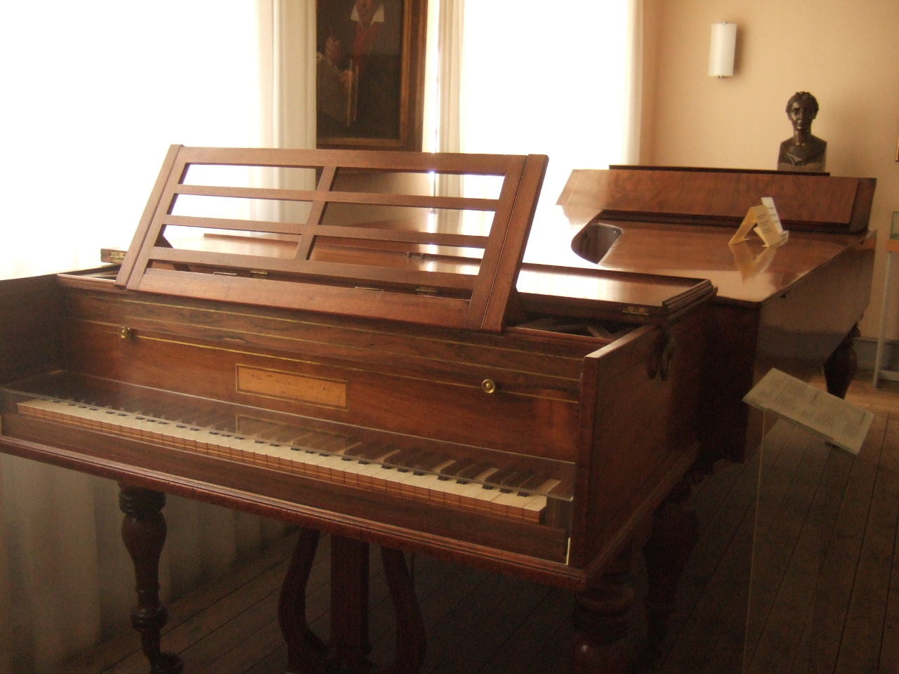 Beethoven-Haus - Instrumente aus Beethovens Besitz: Hammerflügel von Thomas Broadwood (Vordergrund), dahinter ein Hammerflügel von Conrad Graf